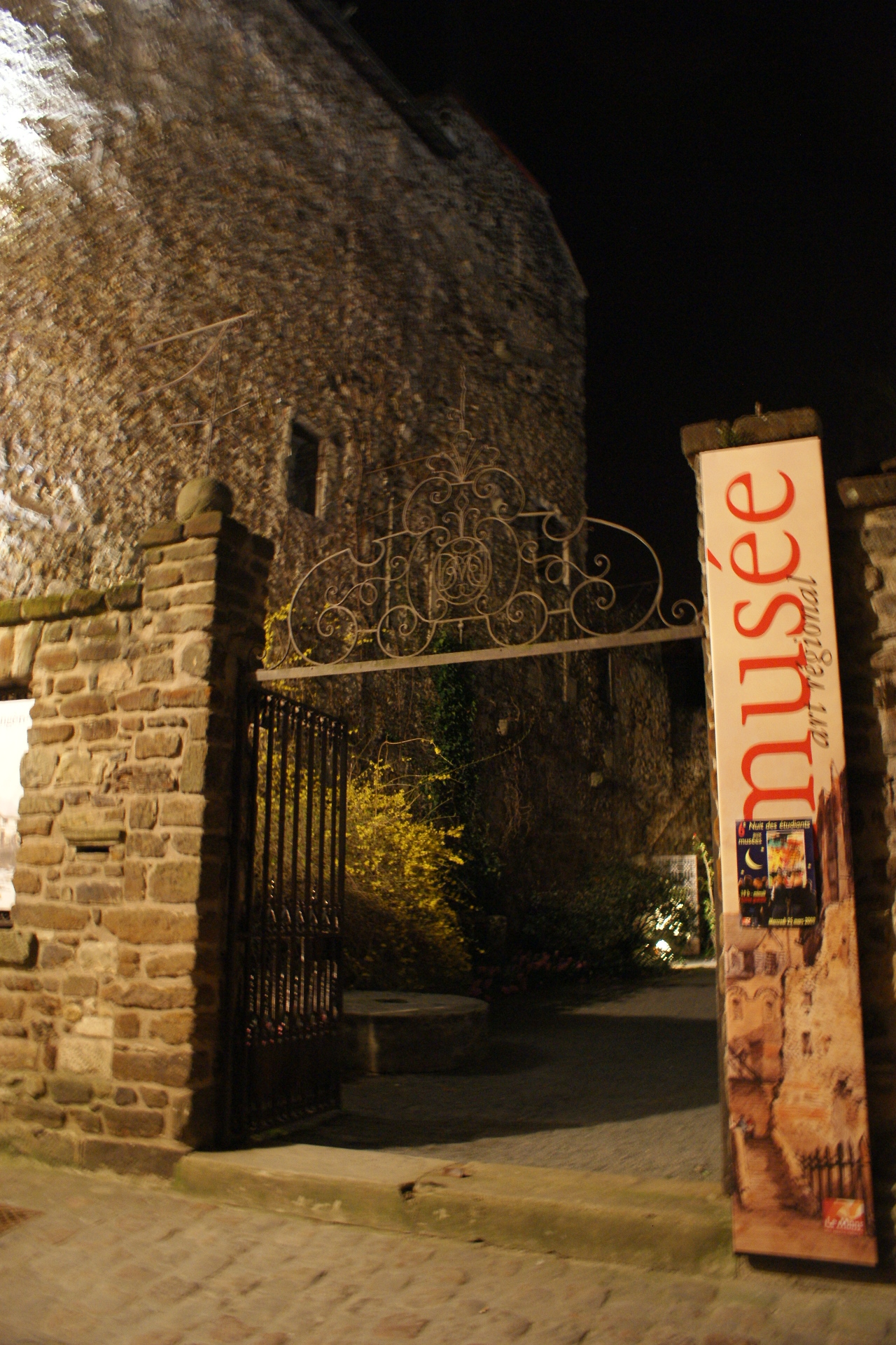 Entrée du musée de la reine Bérengère de nuit lors de "la nuit des étudiants aux musées" en Mars 2009.